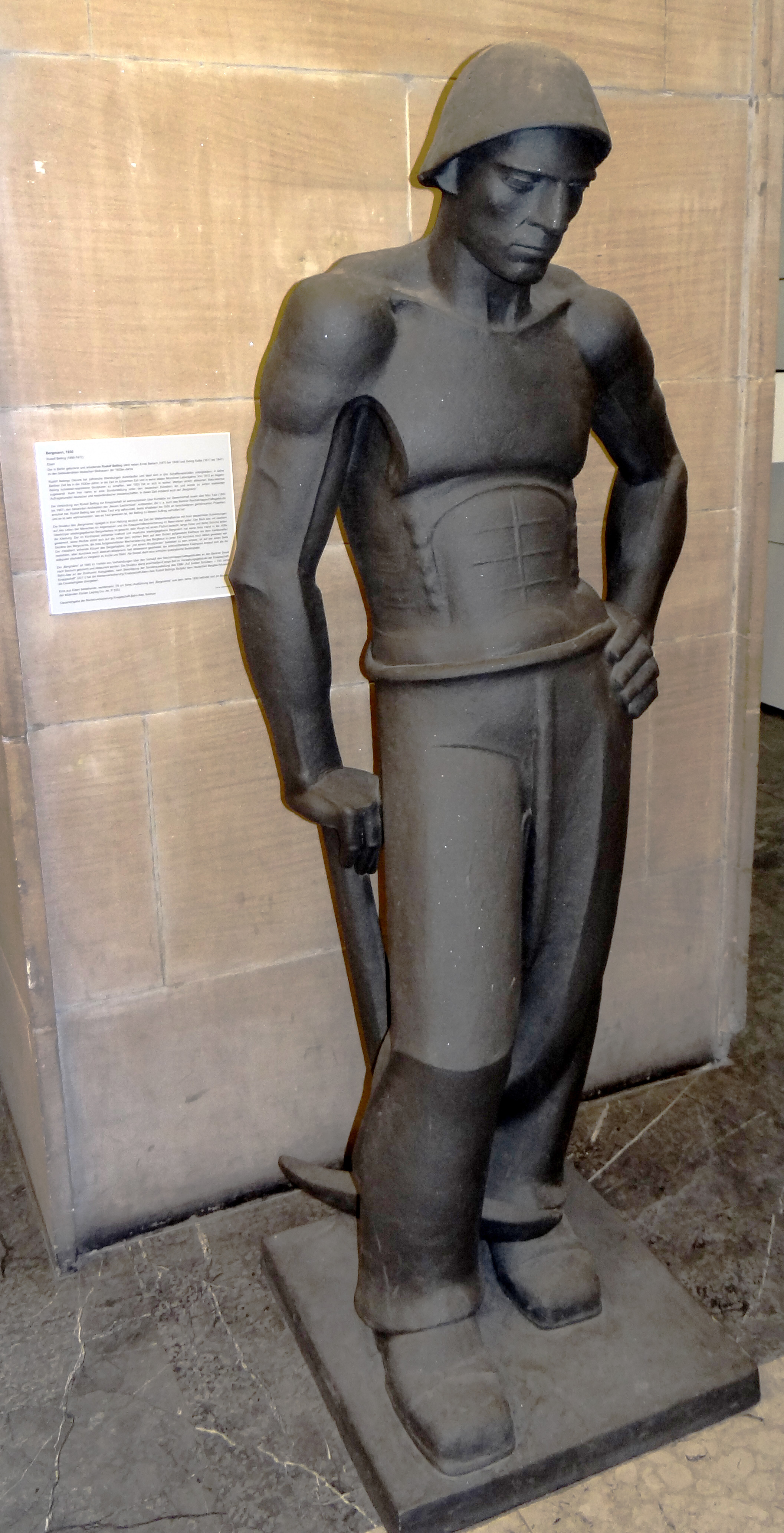 "Bergmann" von Rudolf Belling (1930), Statue im Deutschen Bergbau-Museums Bochum